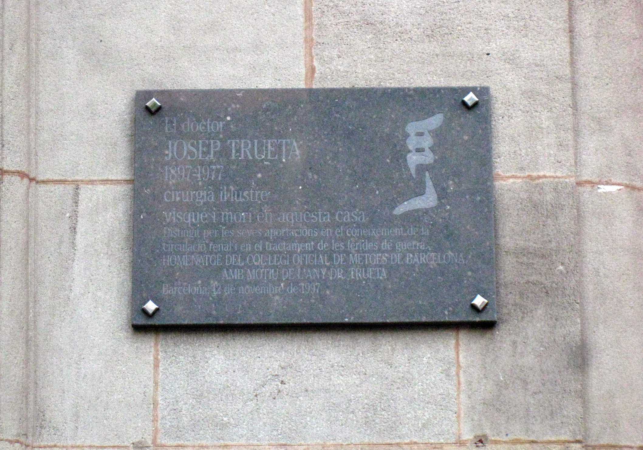 Josep Trueta. Rambla Catalunya, 74 (Barcelona)